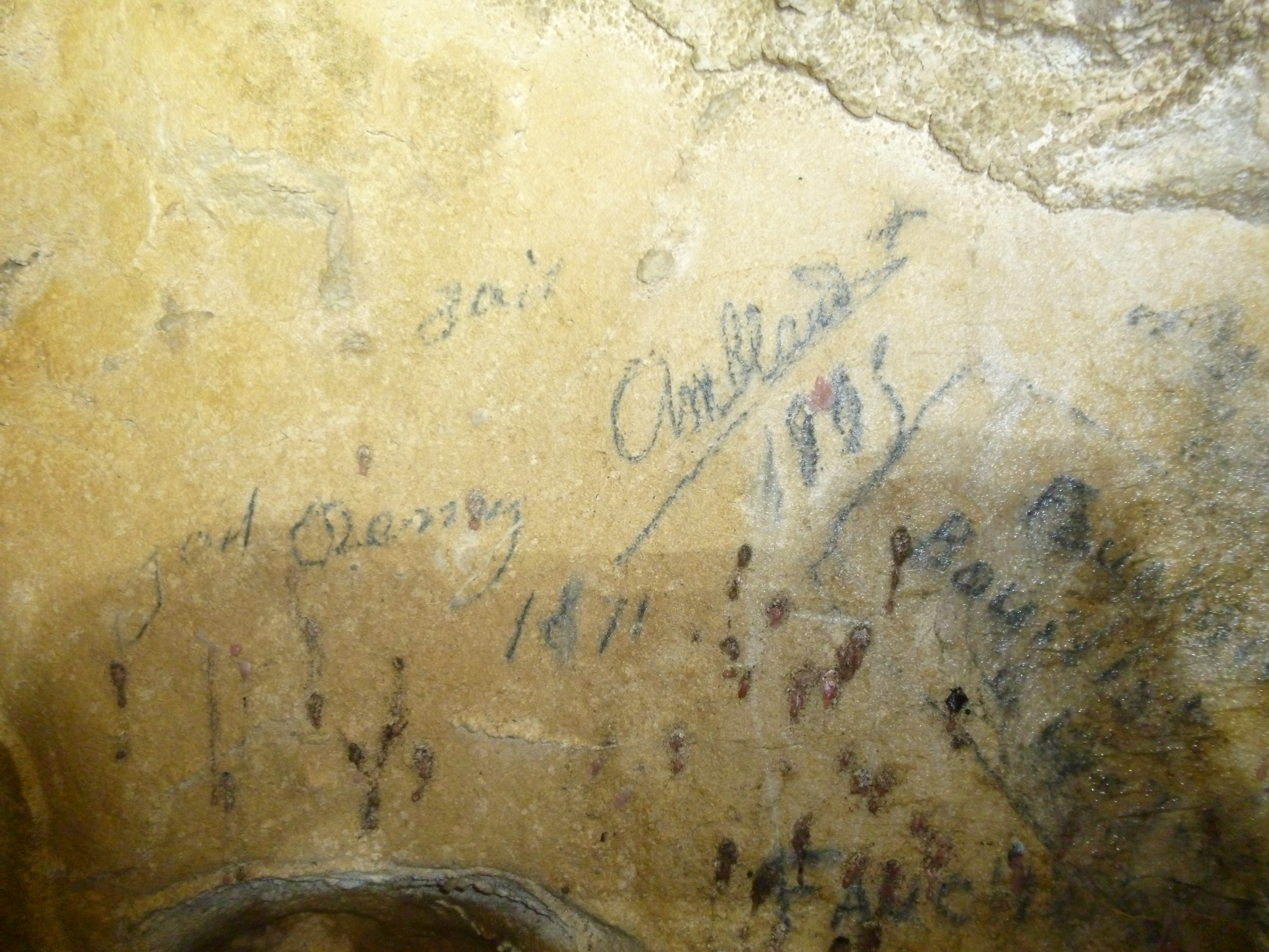 Les premières inscriptions datent de 1769. Celles ci sont datées de 1805 et 1811. On peut voir les traces de bougies utilisées.